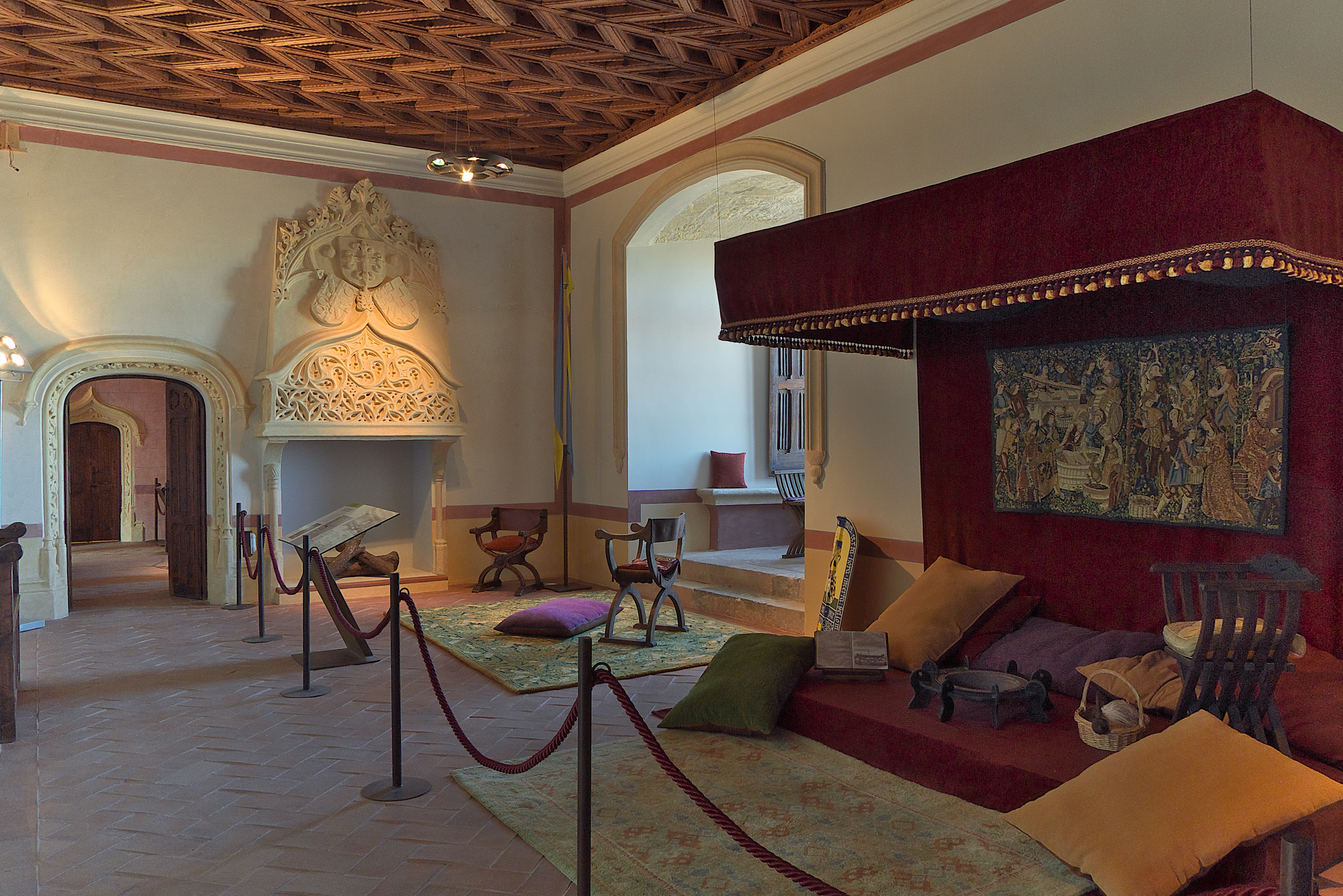 Sala de reuniones de María Portocarrero Enríquez, esposa de Juan Pacheco y Téllez Girón, VII Señora de Moguer, con sus amistades.